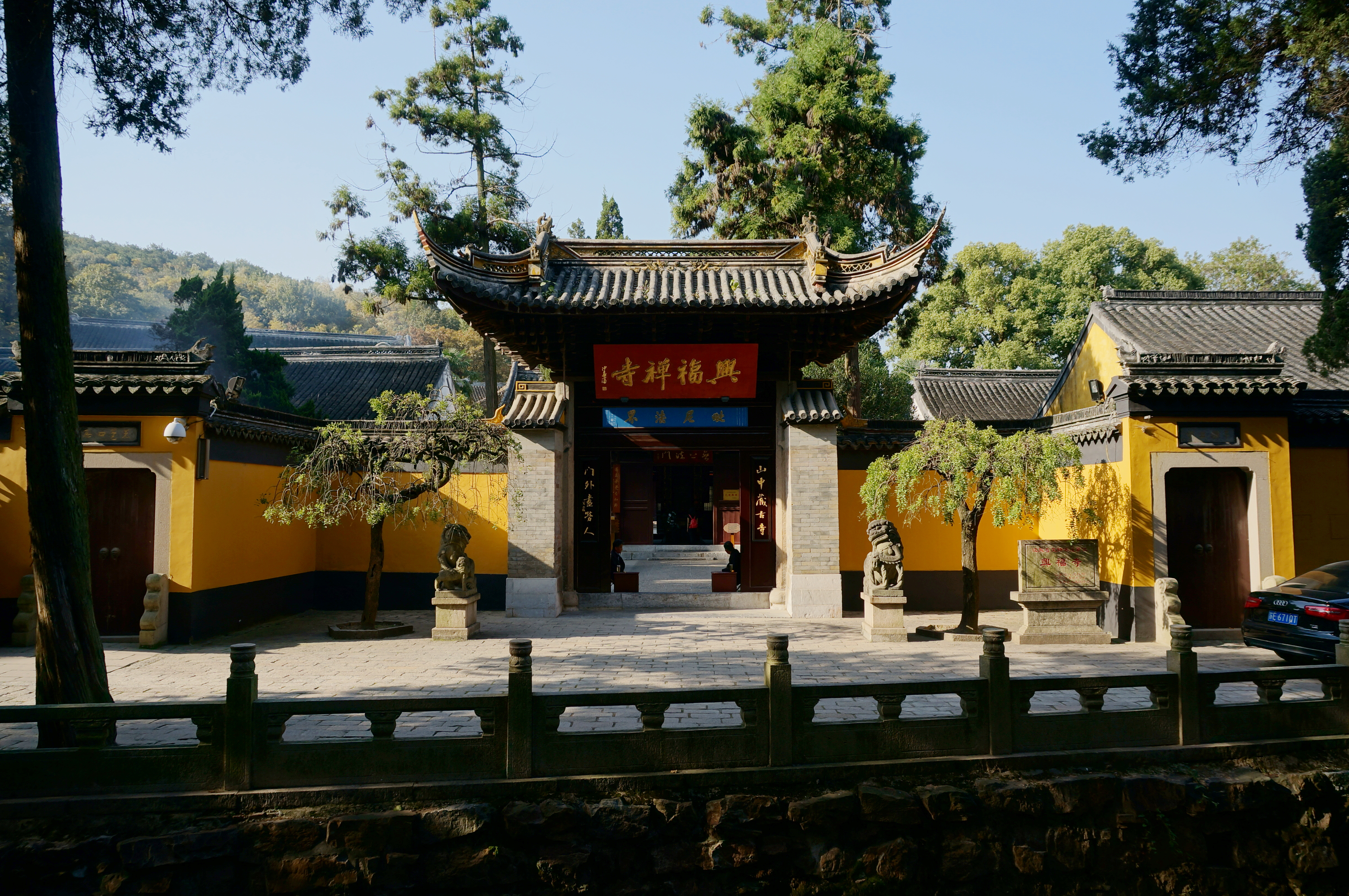 常熟兴福寺，山门南侧。